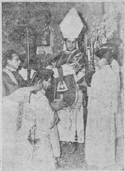 Mons. Luis Fernando Castillo Mendez, ordenando sacerdote a Esteban Corradi en 1948.